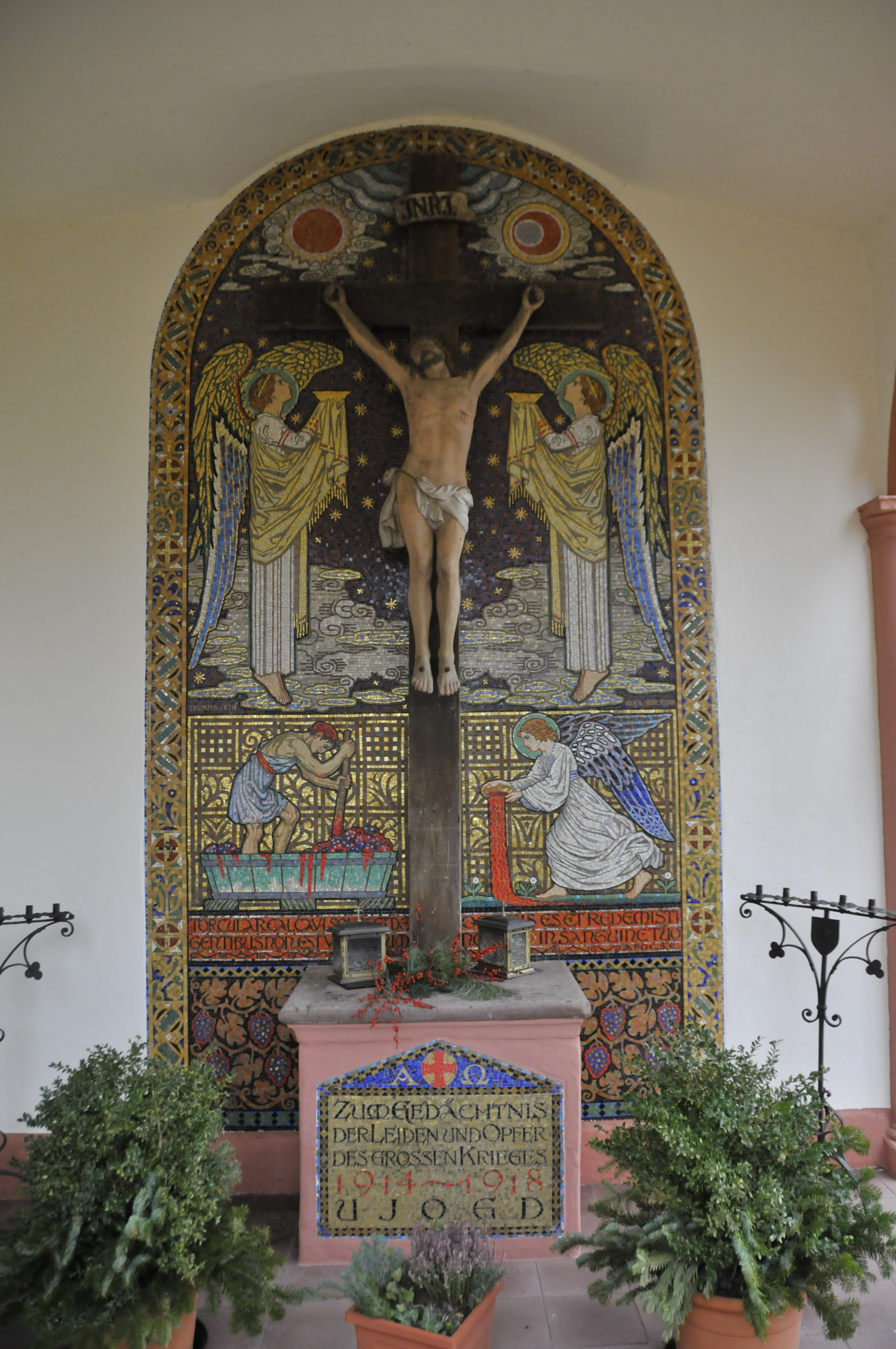 Piesport, Michaelskirche